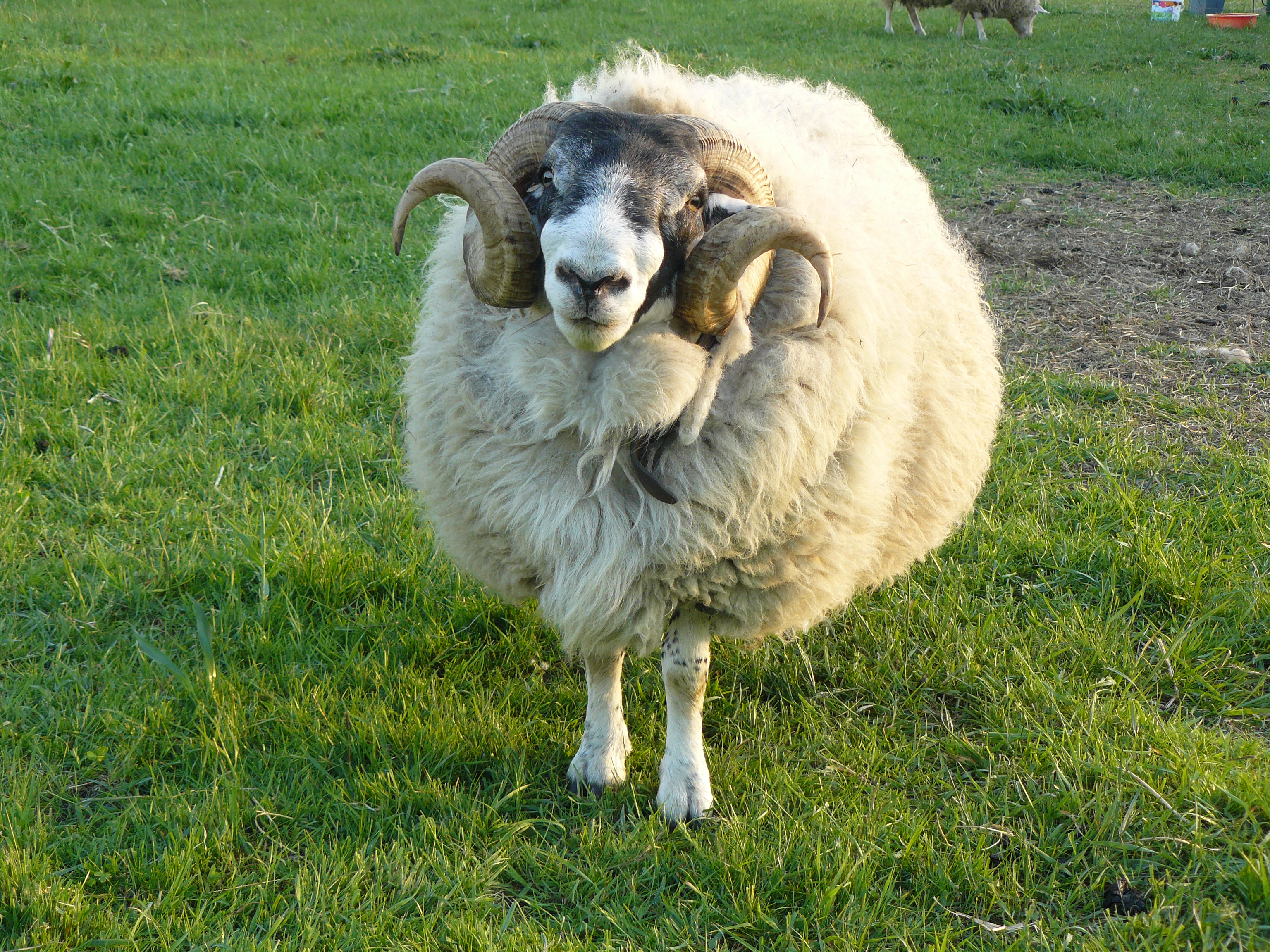 Zuchtbock